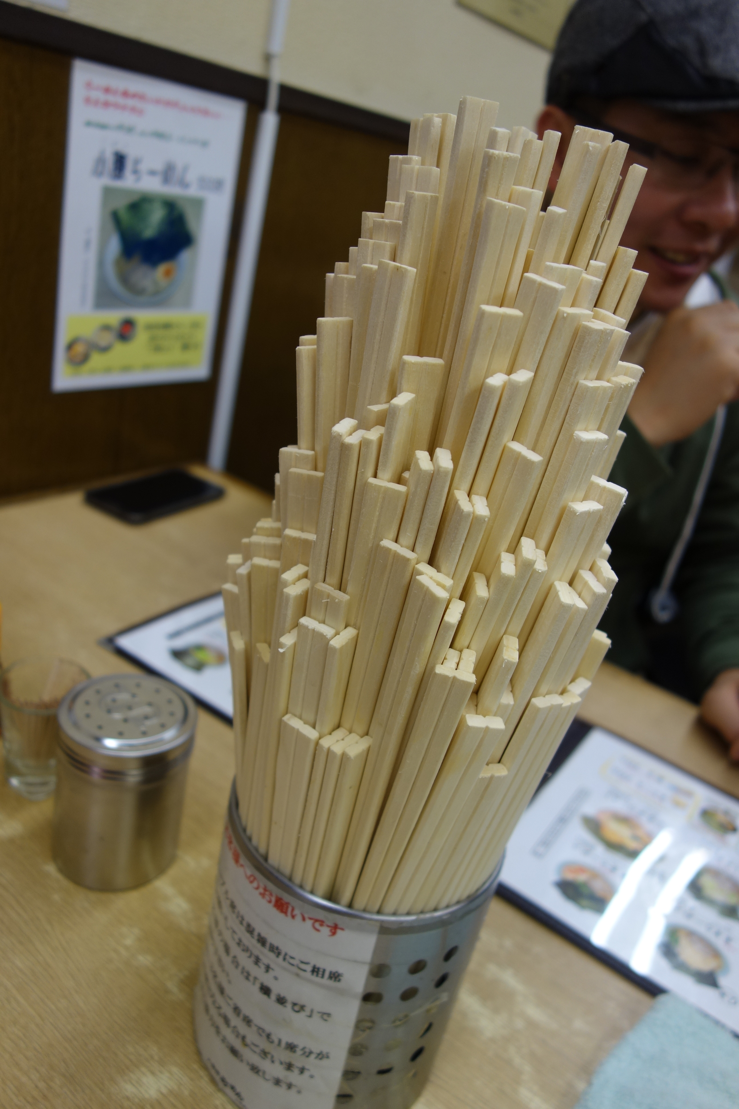 人形町らーめん いなせ